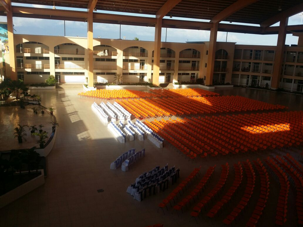 Universidad Autónoma de Santo Domingo